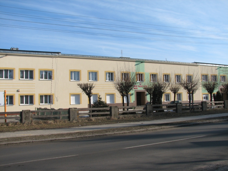 Zespół Szkół Ponadgimnazjalnych nr 5